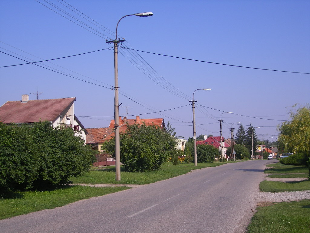 Búcs - utcakép